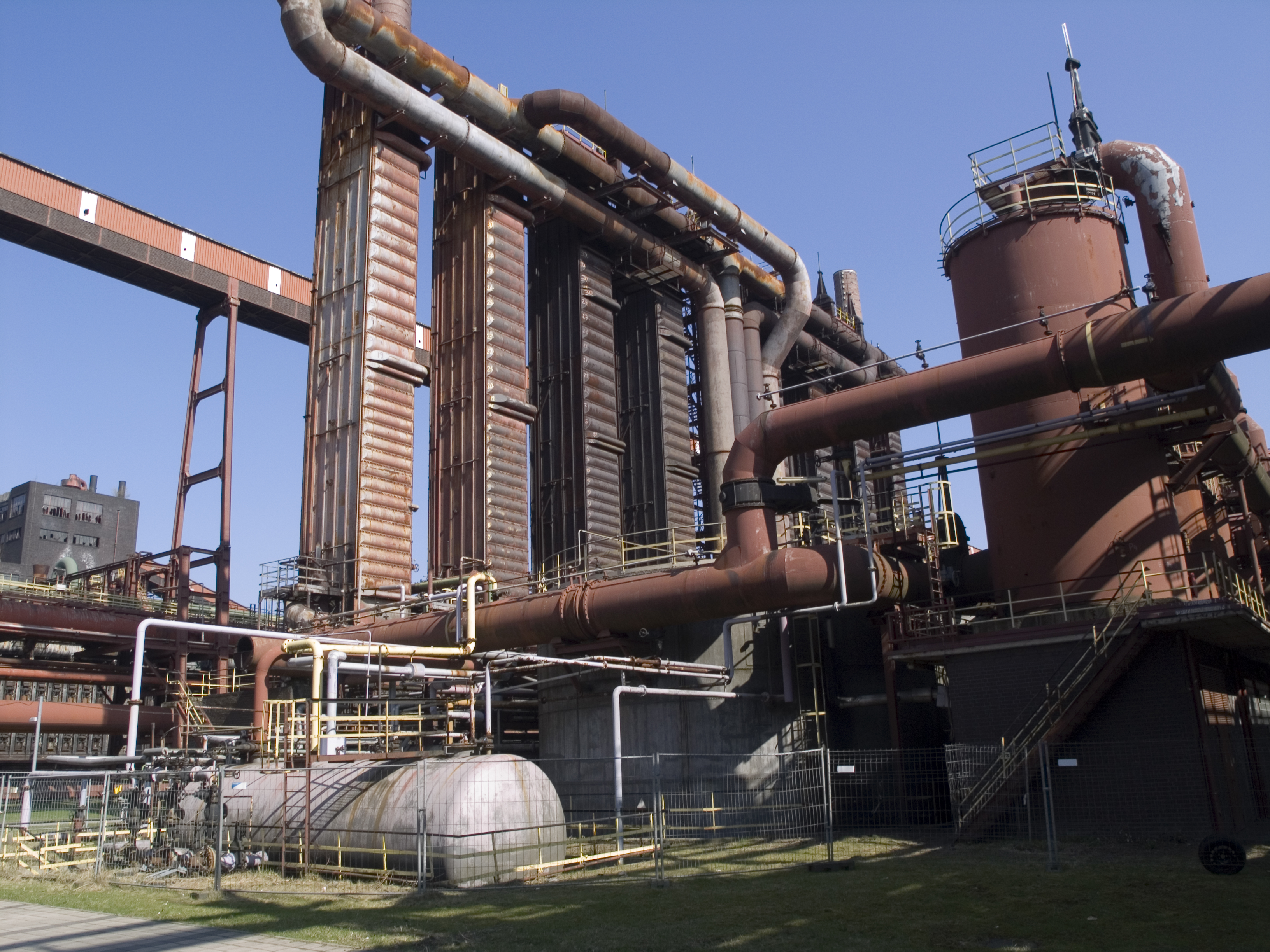 Северный Рейн - Вестфалия, Эссен. Шахта Цольферайн, коксовый завод